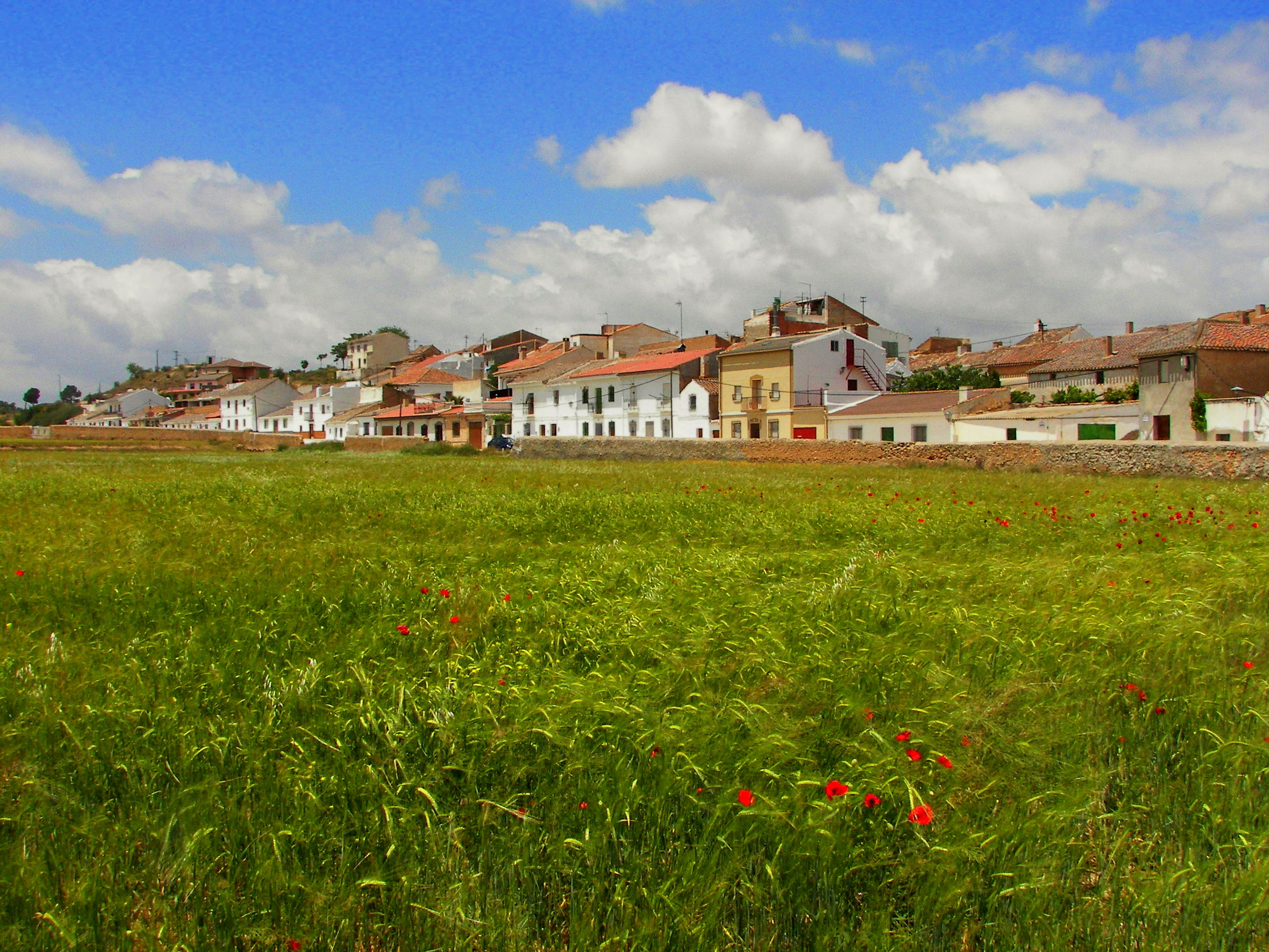 Vista parcial de Huélago, en Granada (España)